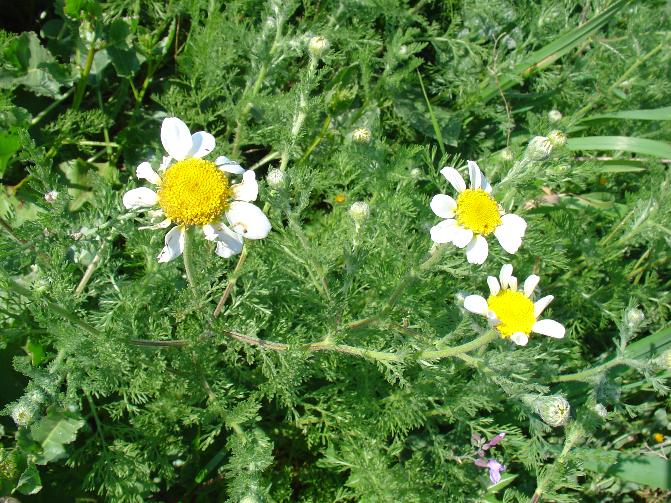 Anacyclus clavatus procedente de margen de camino en Sierra Minera, Murcia, Spain